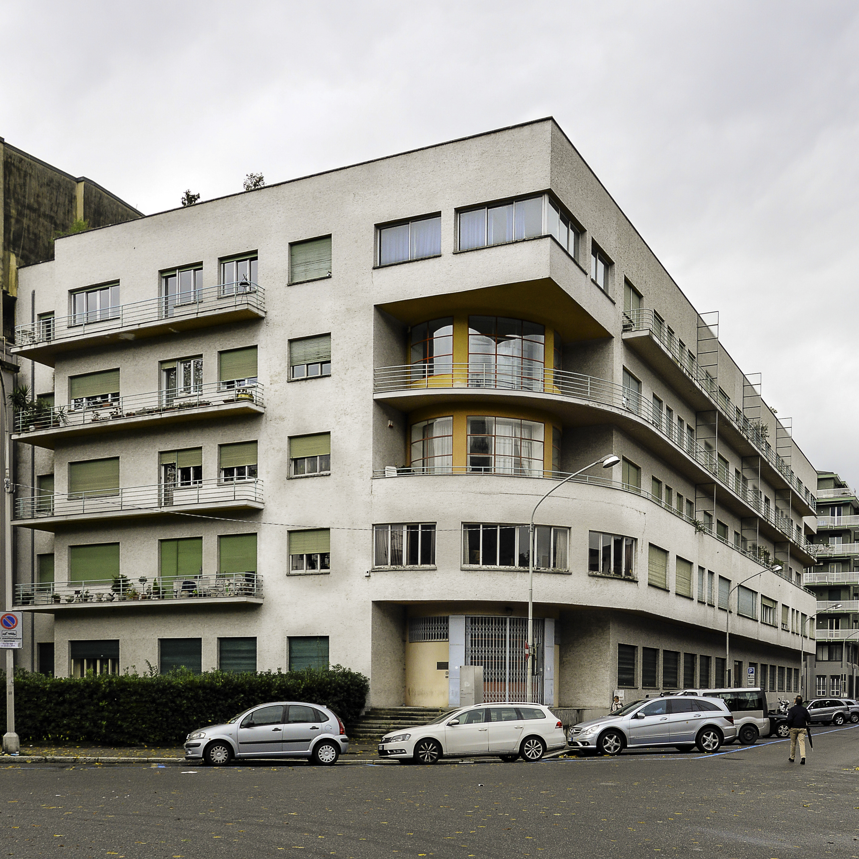 Vista prospettica del Novocomum di Como